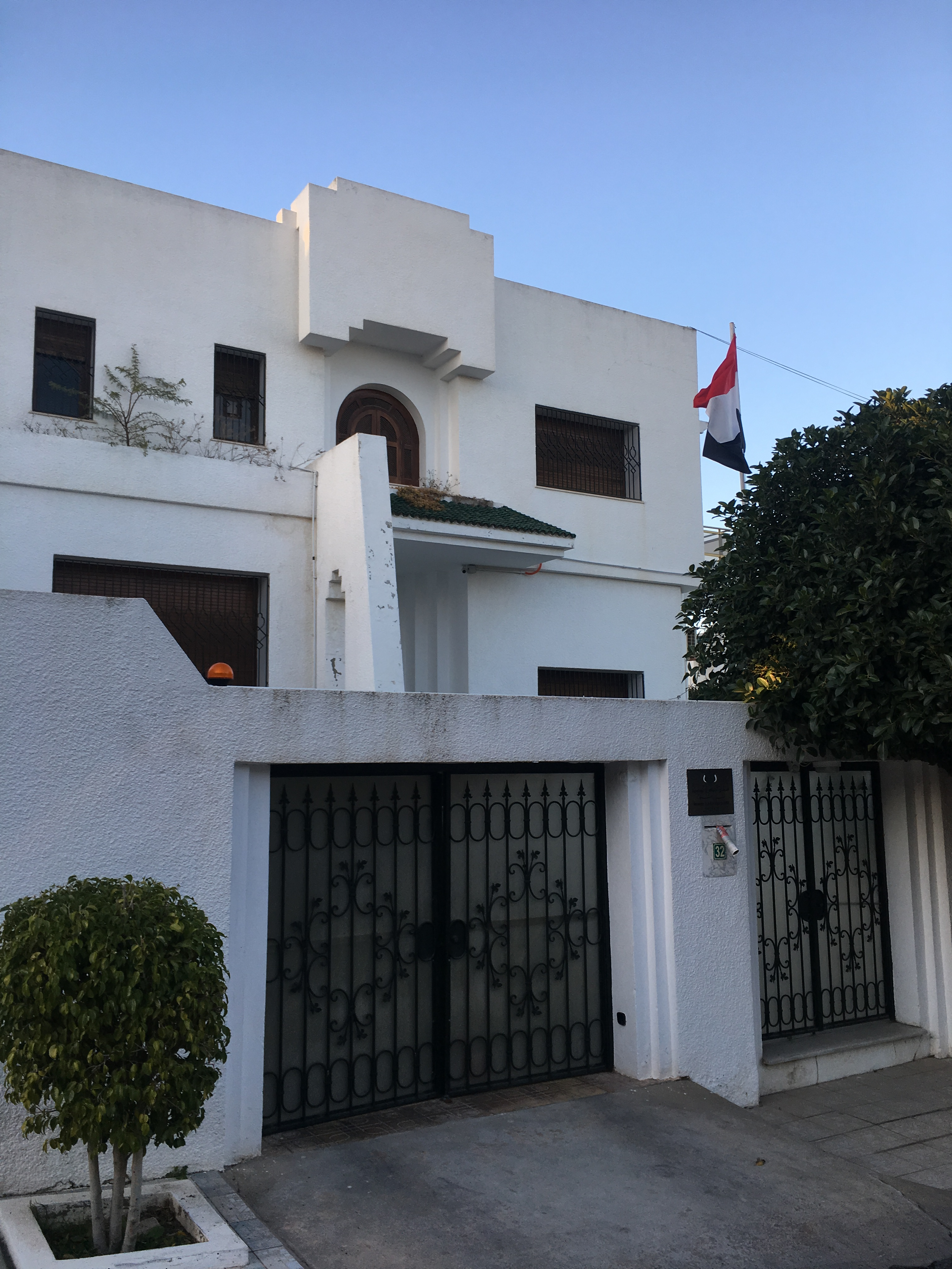 Résidence de l'ambassadeur yéménite à Tunis (quartier Ennasr), 2020.